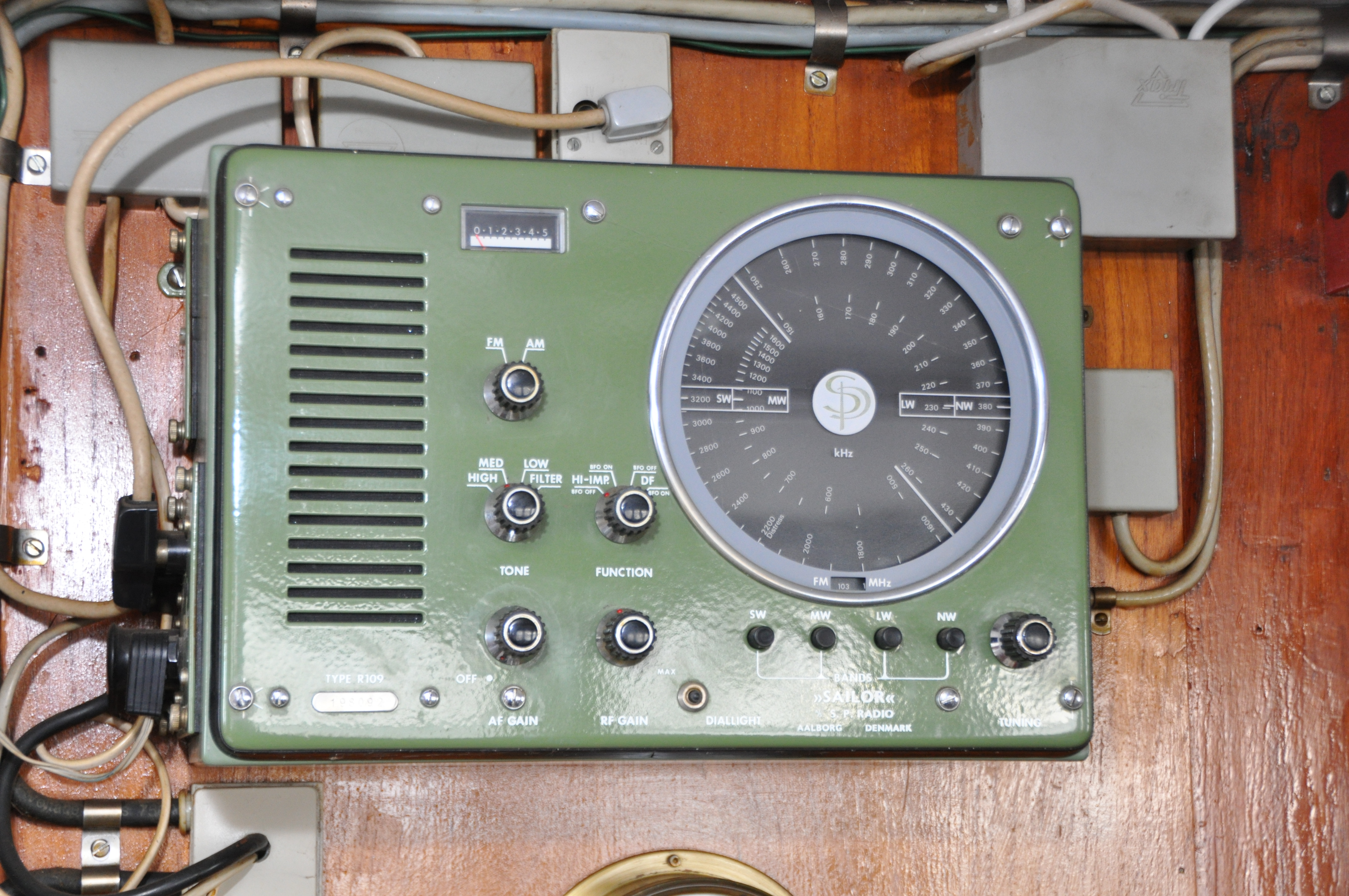 De VARIA NOVA voor de wal in Enkhuizen.